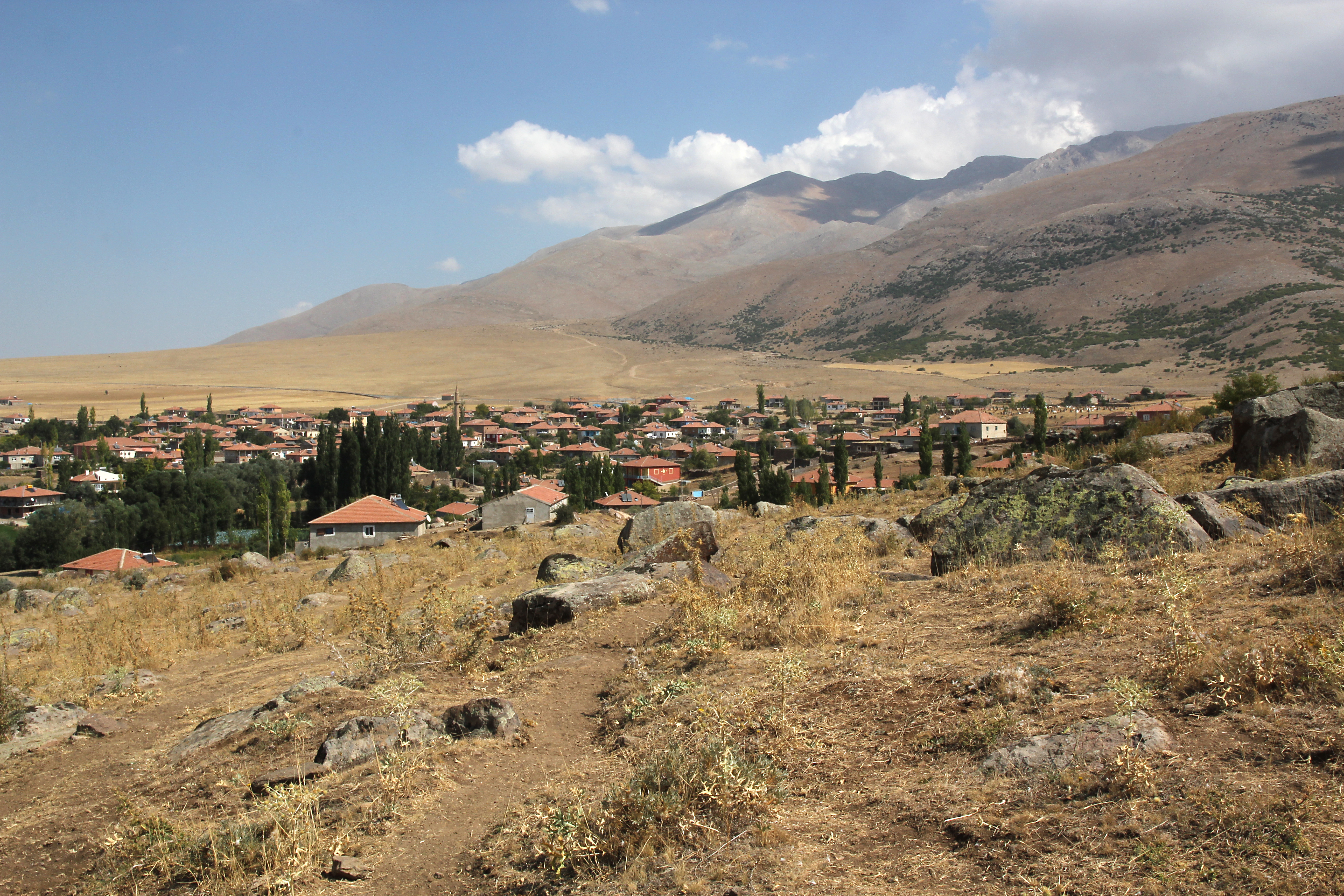 Imamkullu (İmamkulu) bei Develi, Zentraltürkei, Ansicht des Ortes vom Standpunkt des Felsreliefs von İmamkullu